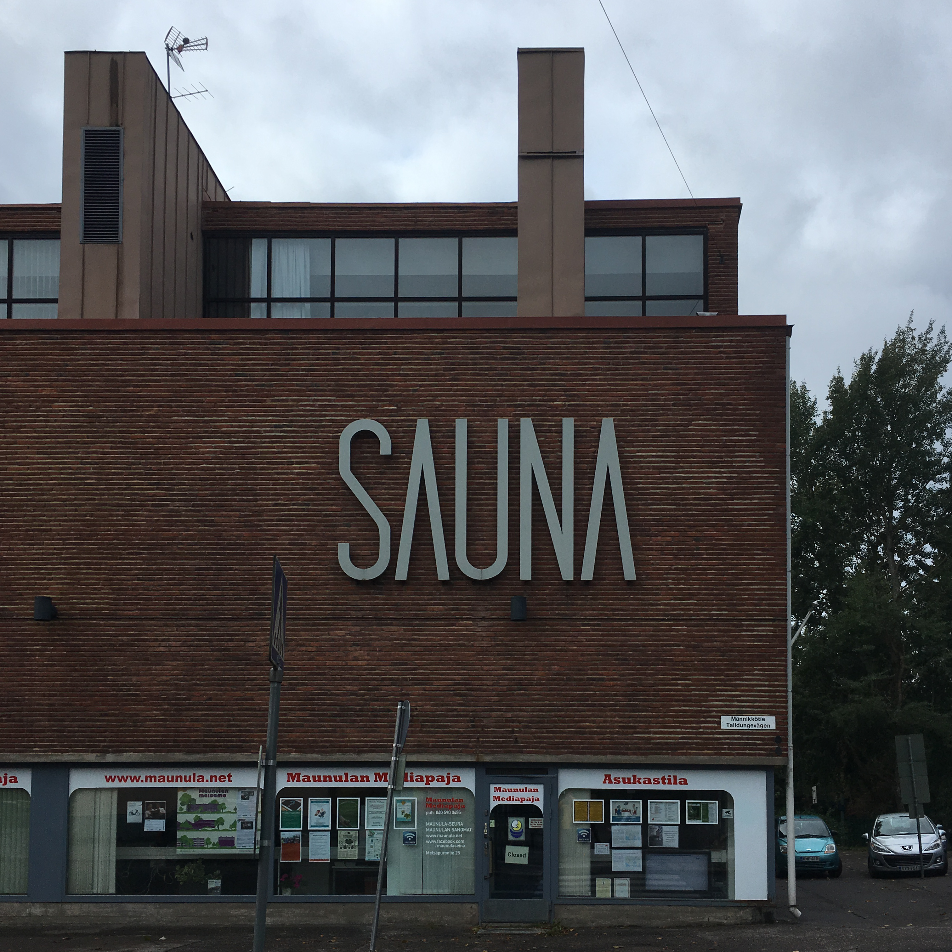 Maunula